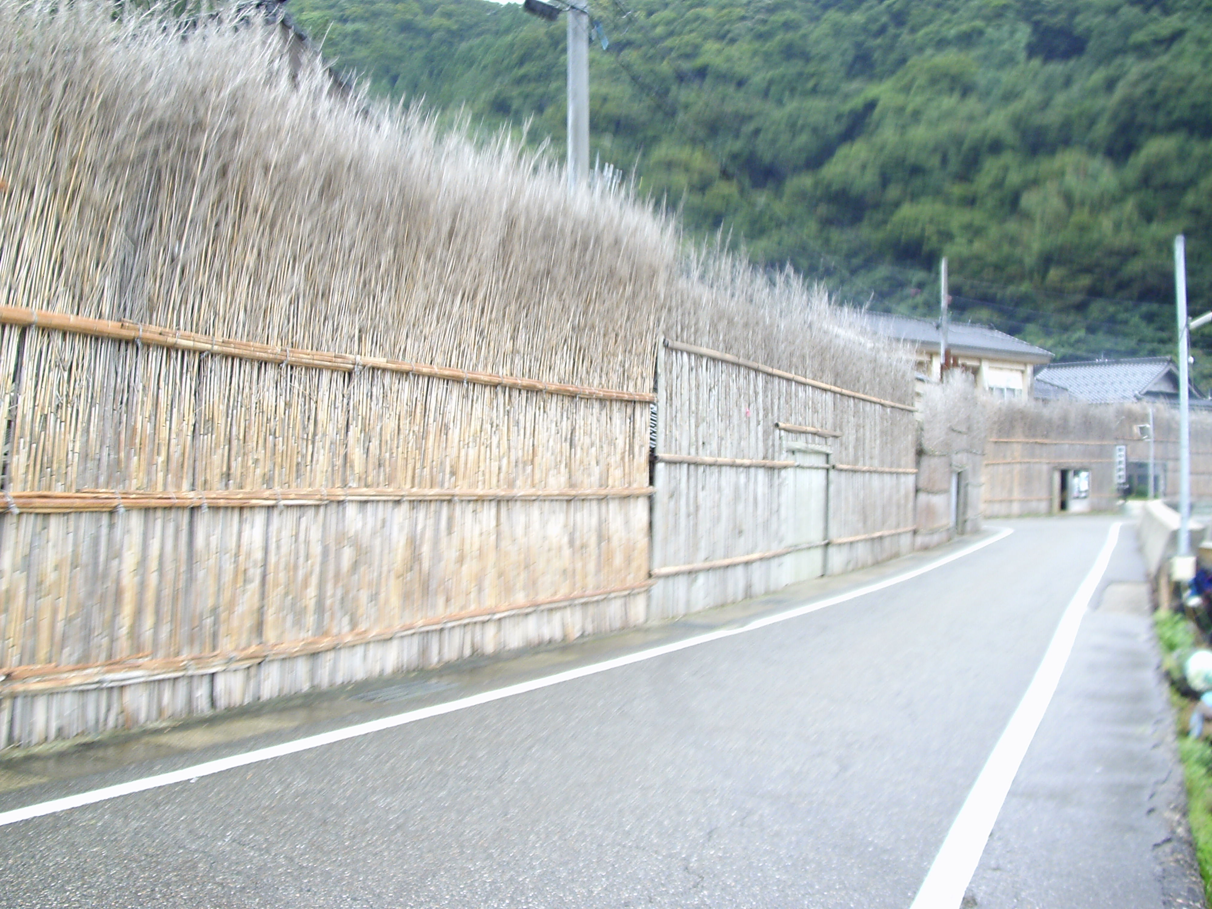 重要文化的景観「大沢・上大沢の間垣集落景観」ー大沢地区